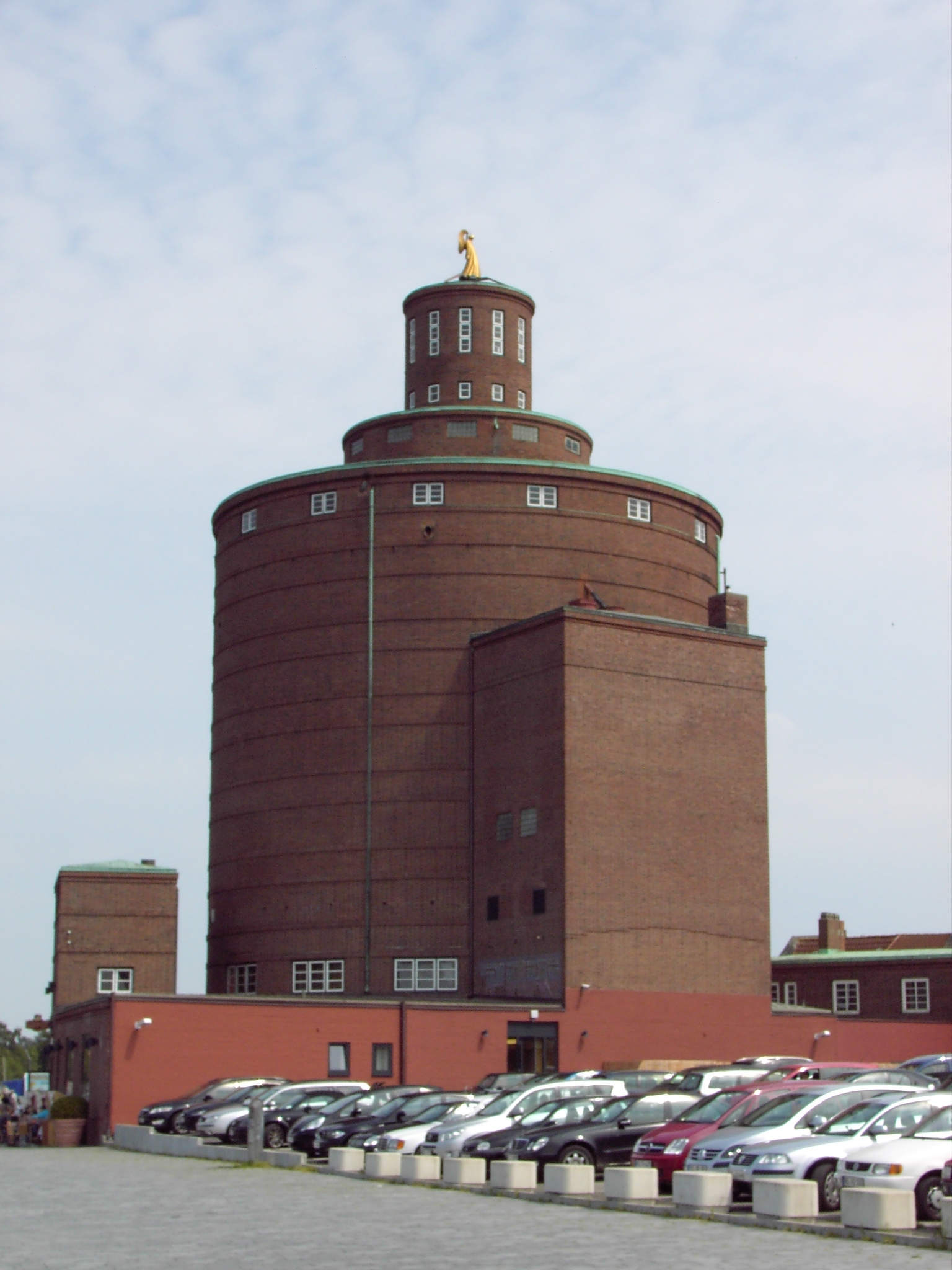 Denkmalgeschütztes Rundsilo in Eckernförde (Rückansicht)